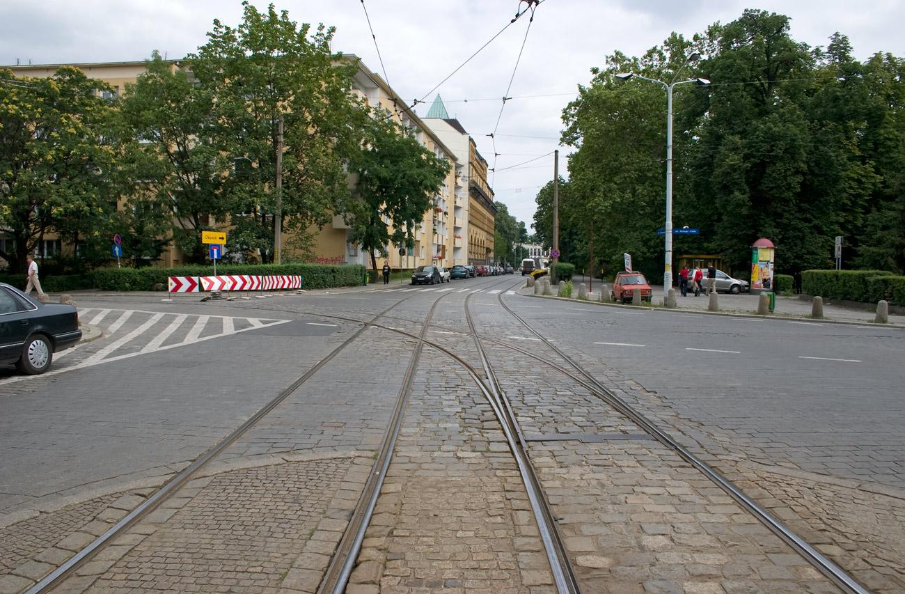 Skrzyżowanie pl. Teatralnego, ulicy Bożego Ciała (po prawej), Widok (po lewej) i ulicy Teatralnej (na wprost). Obecnie wygląda ono inaczej - pojawiły się trzy nowe skręty dla tramwajów i kostkę brukową zamieniono na masę bitumiczną (zwaną popularnie "asfaltem").